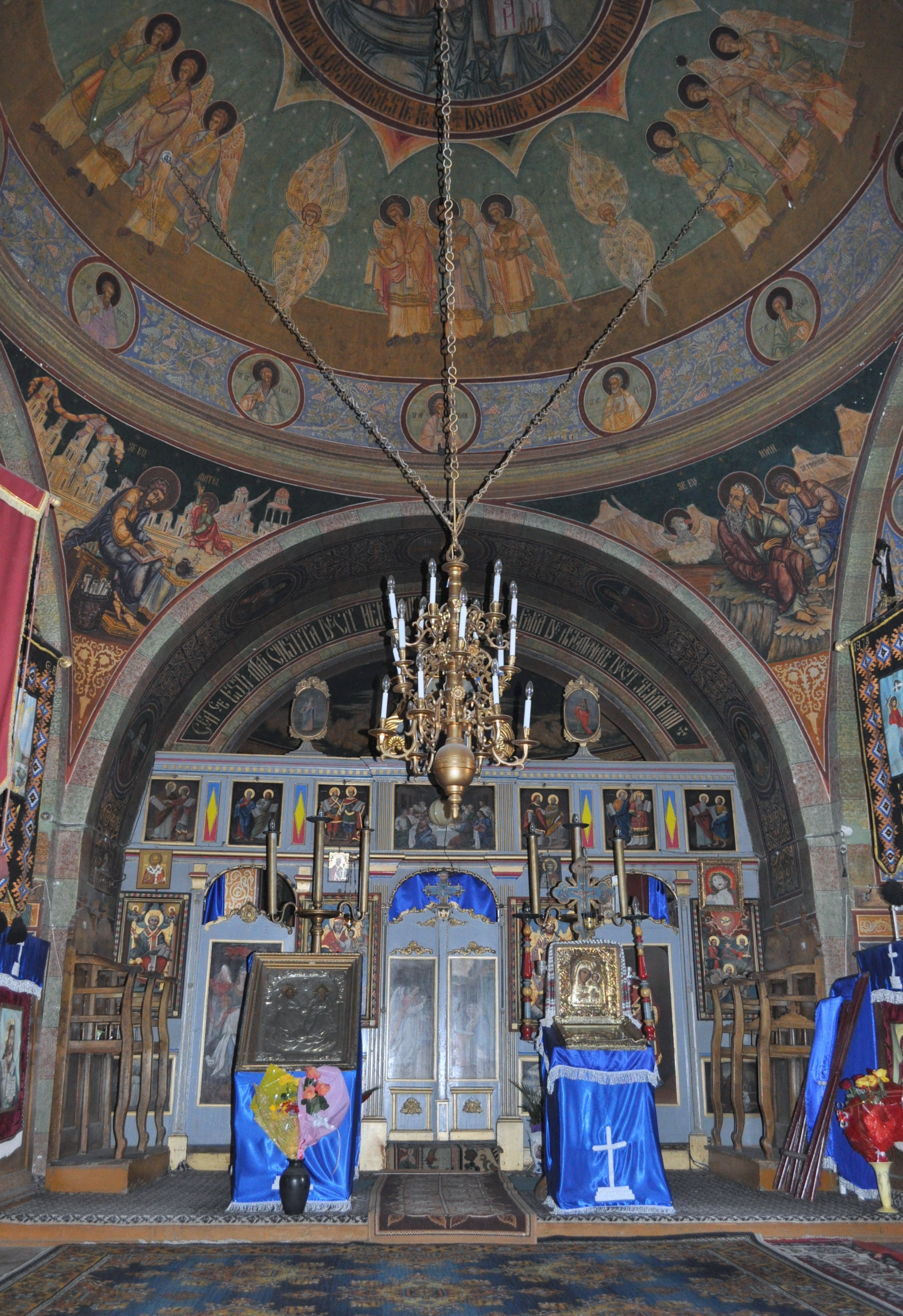 Biserica ortodoxă „Sfânta Treime”